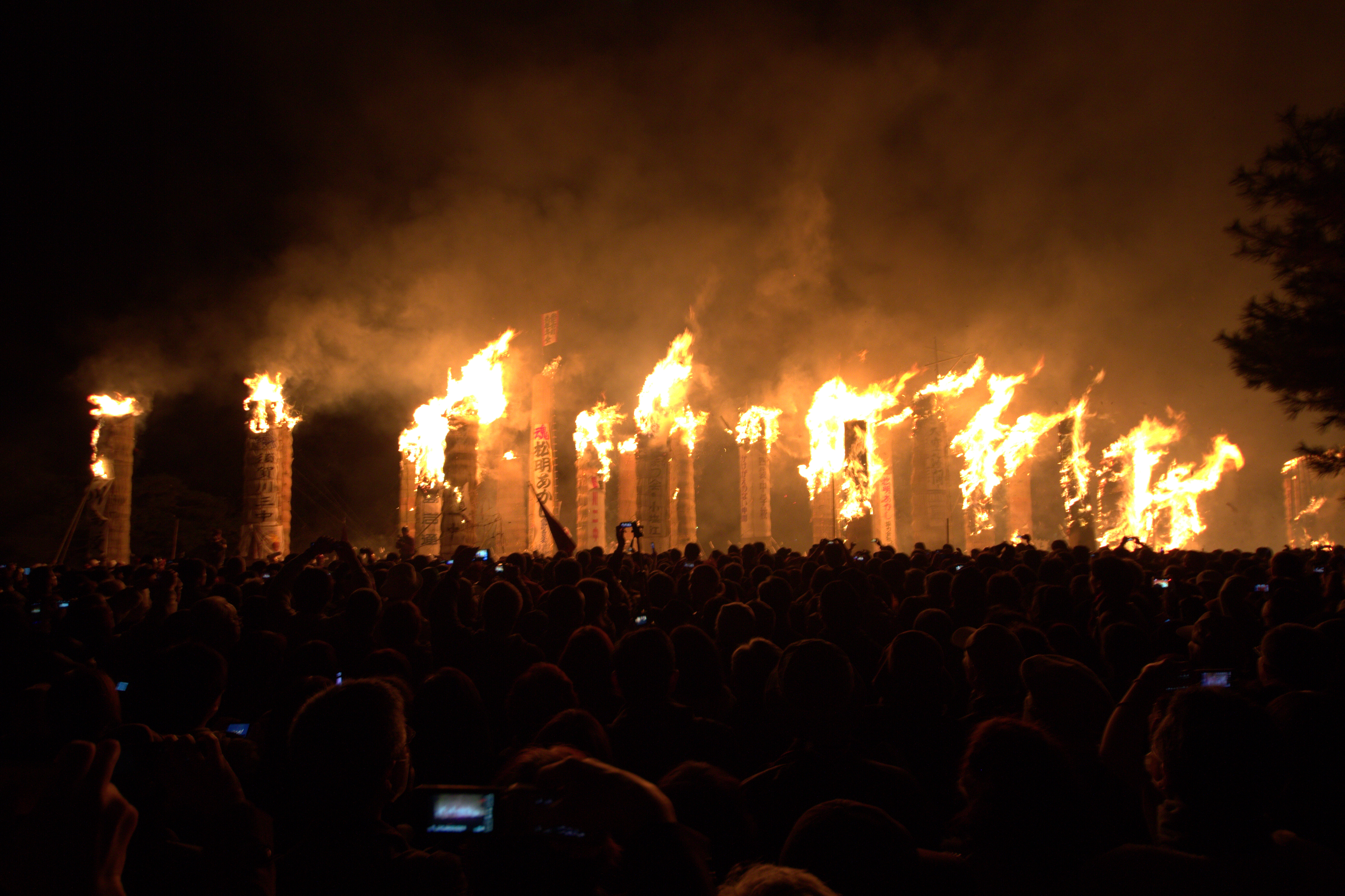 Kuriyasawa, Sukagawa, Fukushima Prefecture 962-0866, Japan 須賀川松明あかし